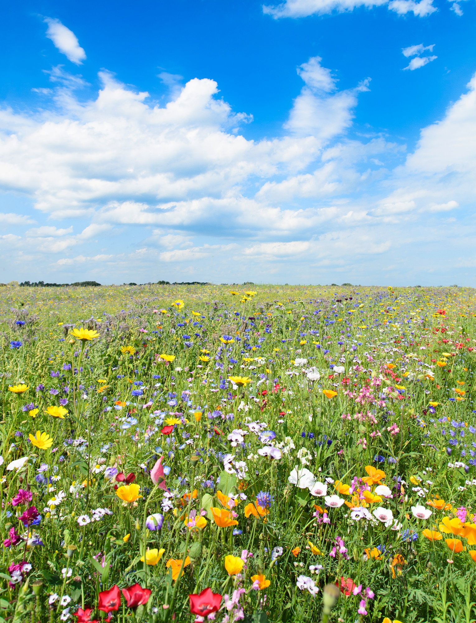 Blumen, Blumenwiese, Wild Blumen